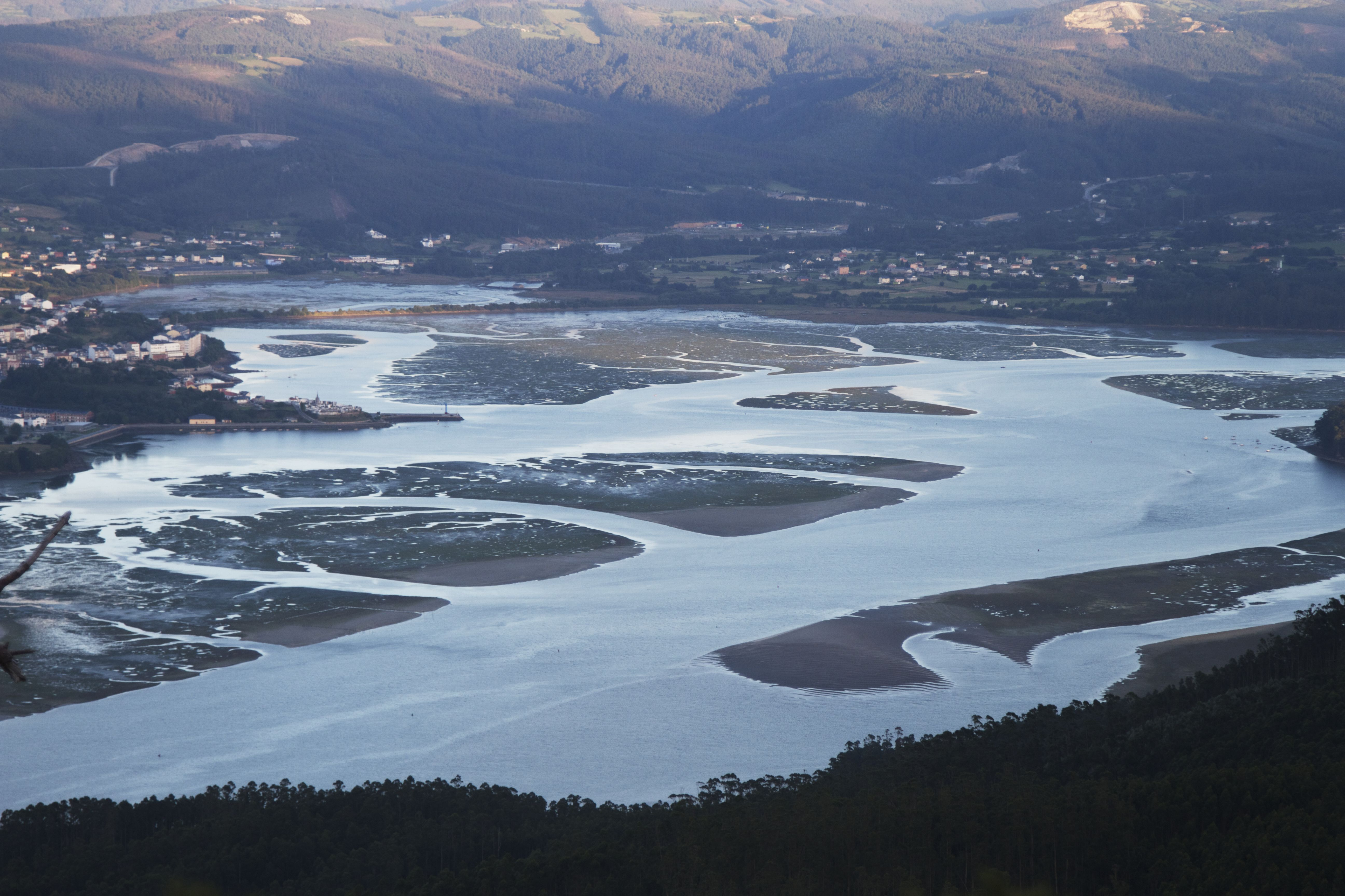 Ria de Ortigueira This is a photography of a Site of Community Importance in Spain with the ID: ES1110001. Natura2000 entry, EEA entry